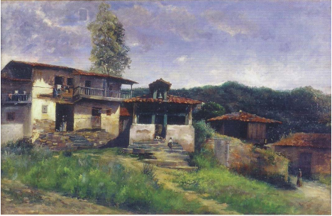 La obra representa una capilla de una aldea.